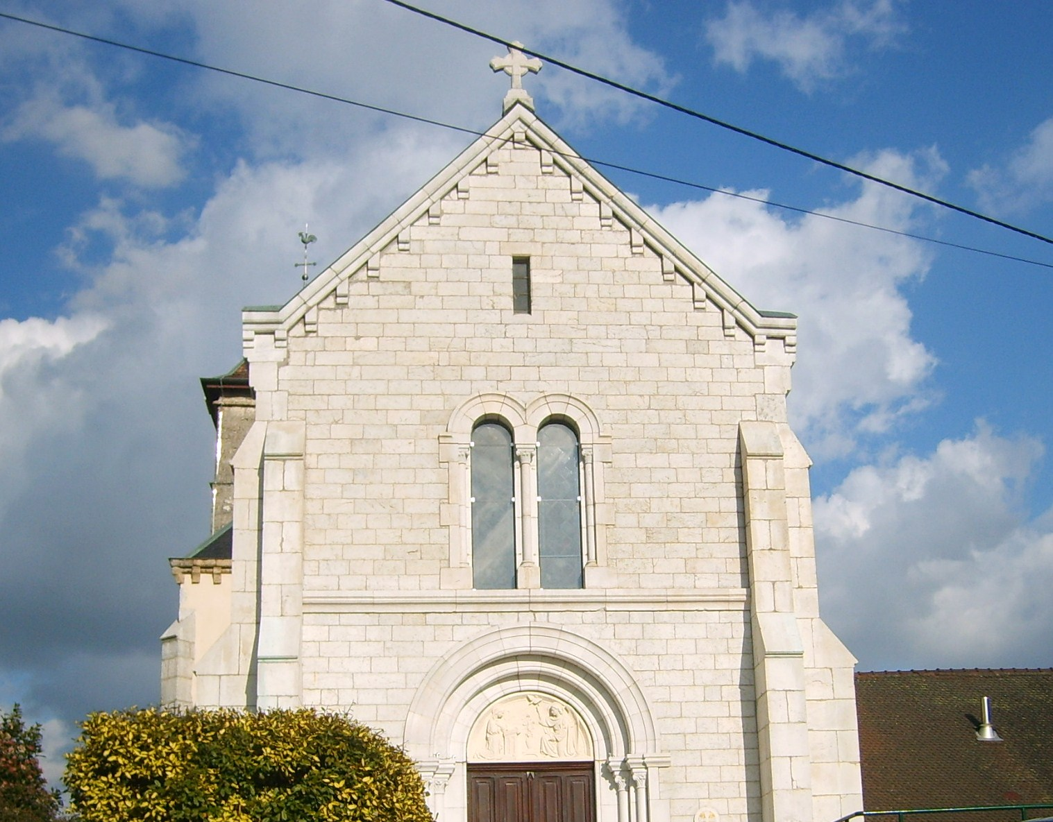 Lovagny, commune française, située dans le département de la Haute-Savoie et la région Rhône-Alpes. Vue sur la façade de l'église.